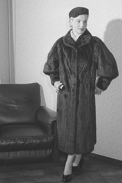 Dark Nerzmantel, ausgelassene Verarbeitung, DDR, 1954.